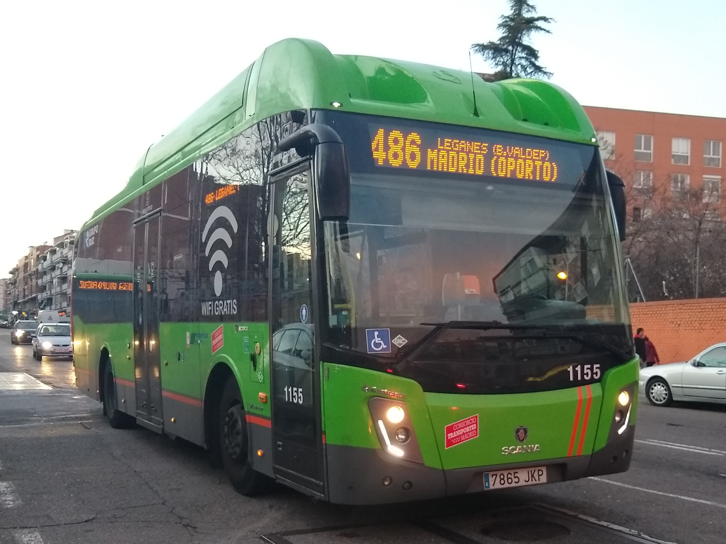 Autobús interurbano de Madrid